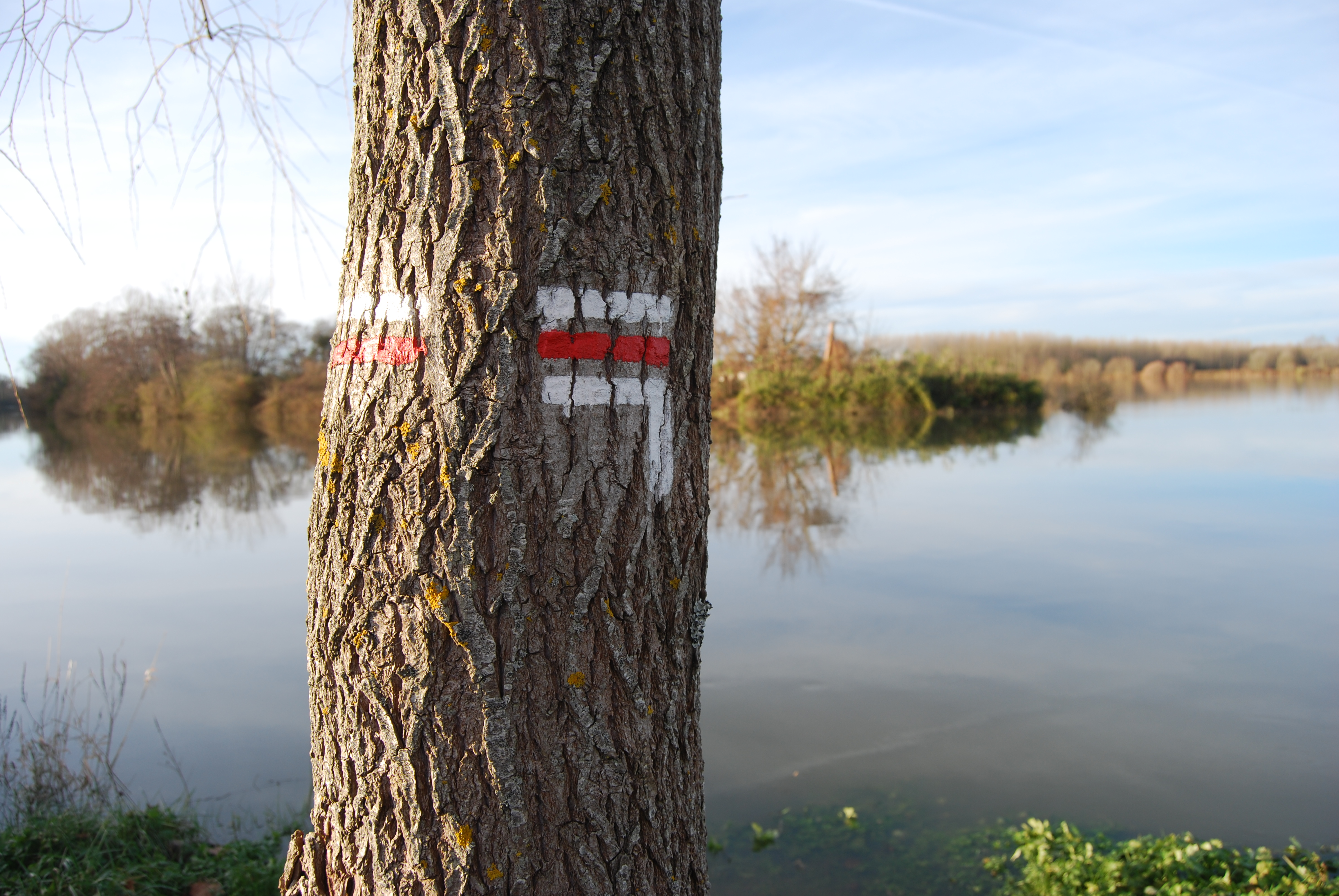 Marque du GR 8 au niveau de l'îlot du Sablot à Urt.